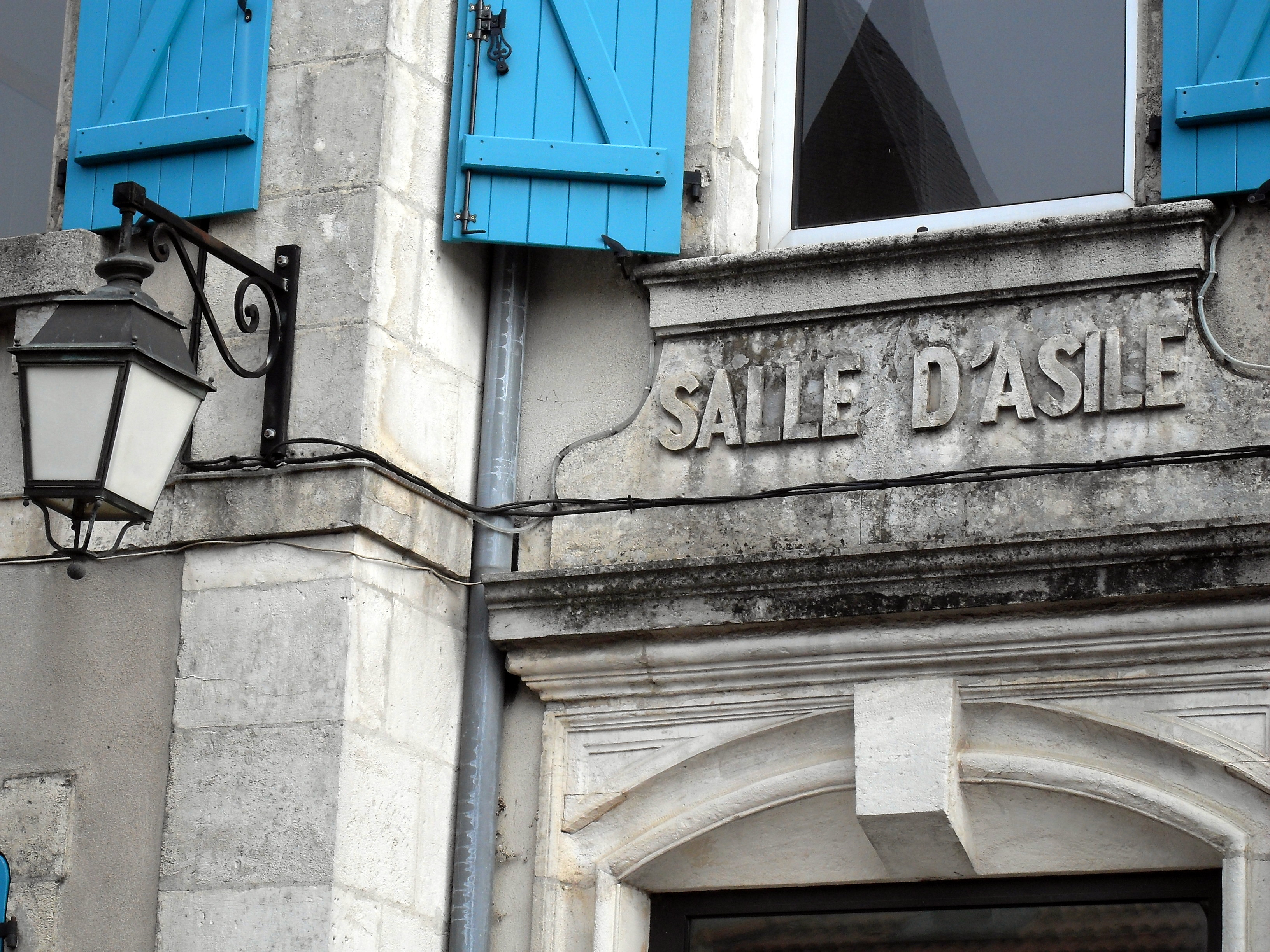 Trondes Salle d'asile - La salle d'asile est l'ancêtre de l'école maternelle.